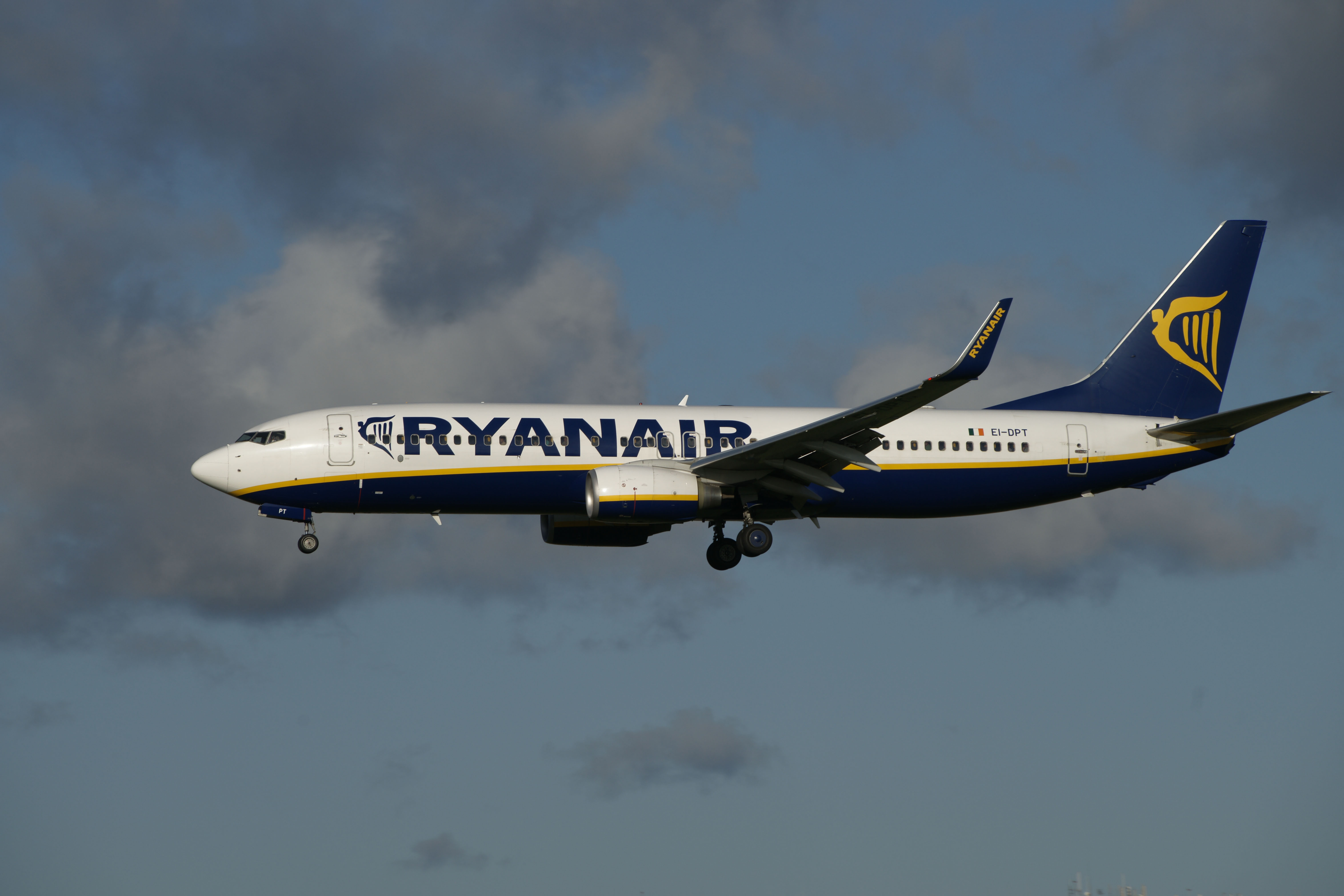 Ryanair 737-800